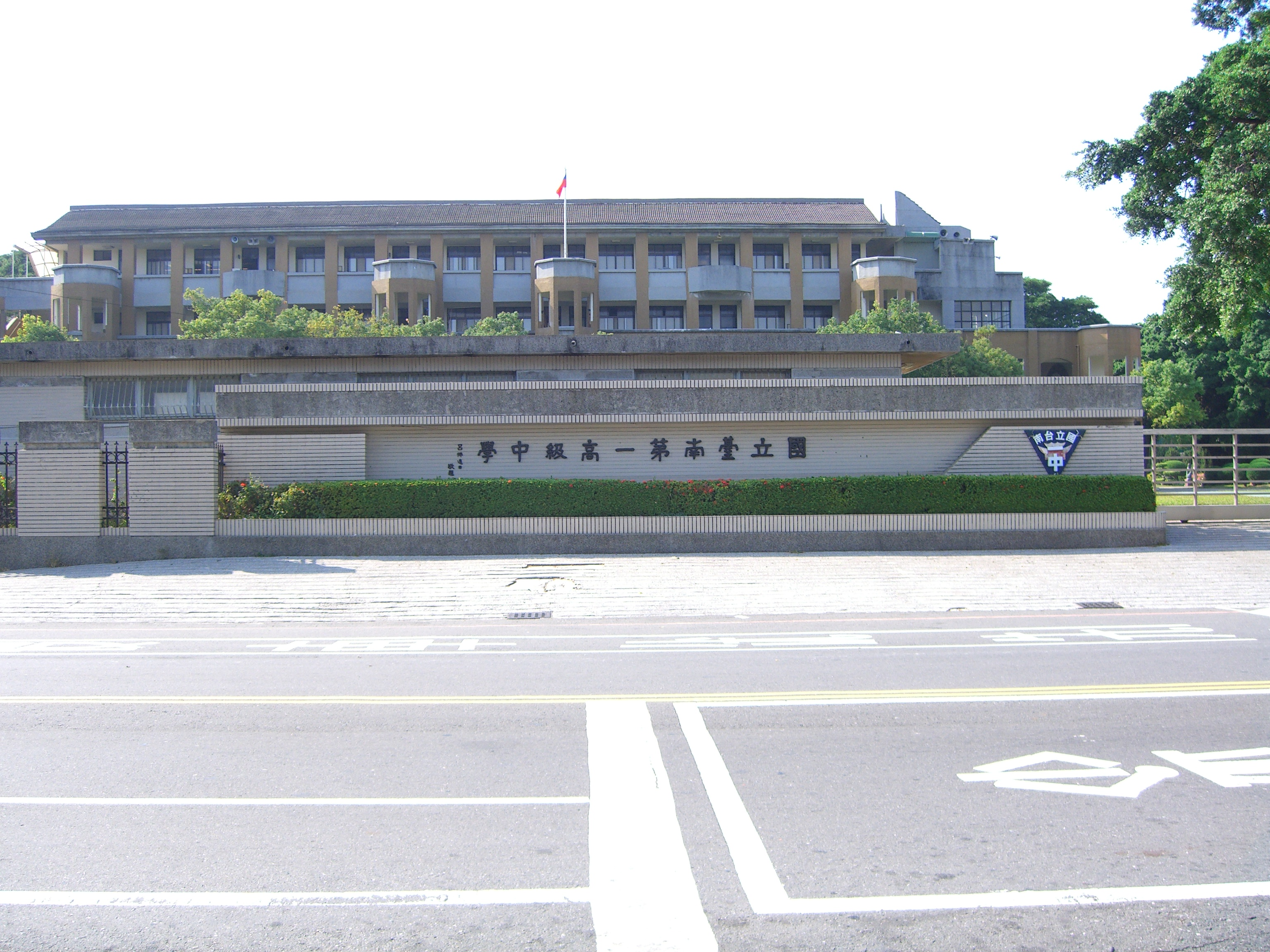 TNFSH Side Entrance 台南一中勝利路門